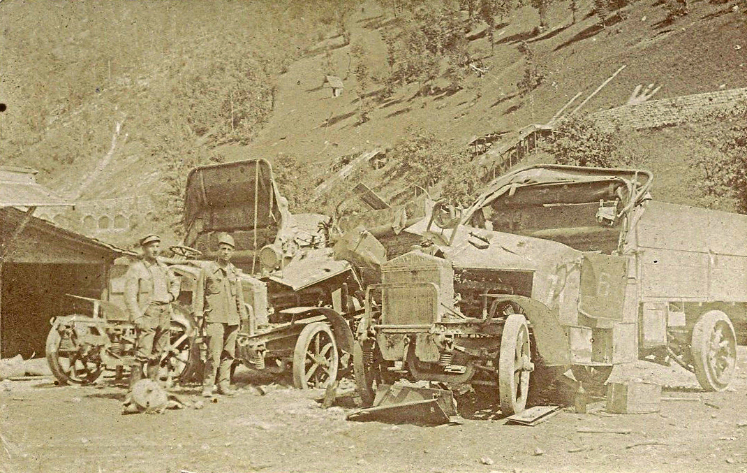 Bača pri Modreju - Herman Büssing.